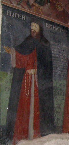 Manastirea Plataresti - Pictura pronaos - Egumenul Vasile